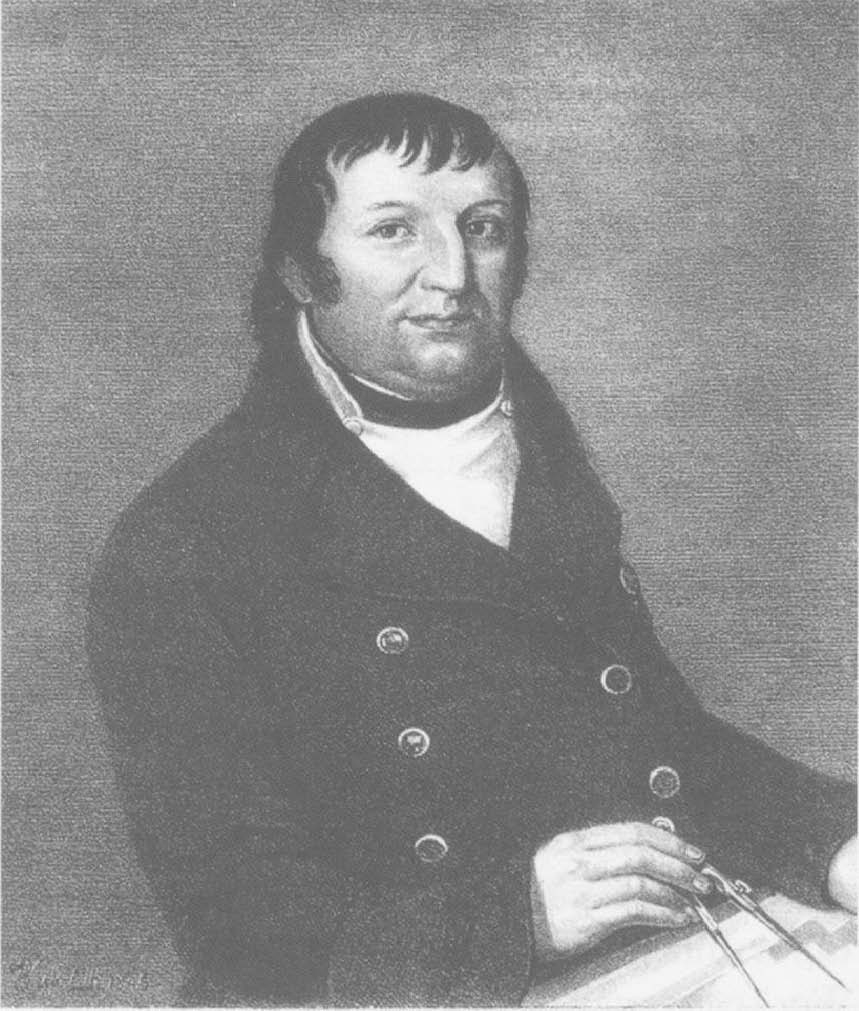 Porträt von Reinhard Ferdinand Heinrich Fischer.